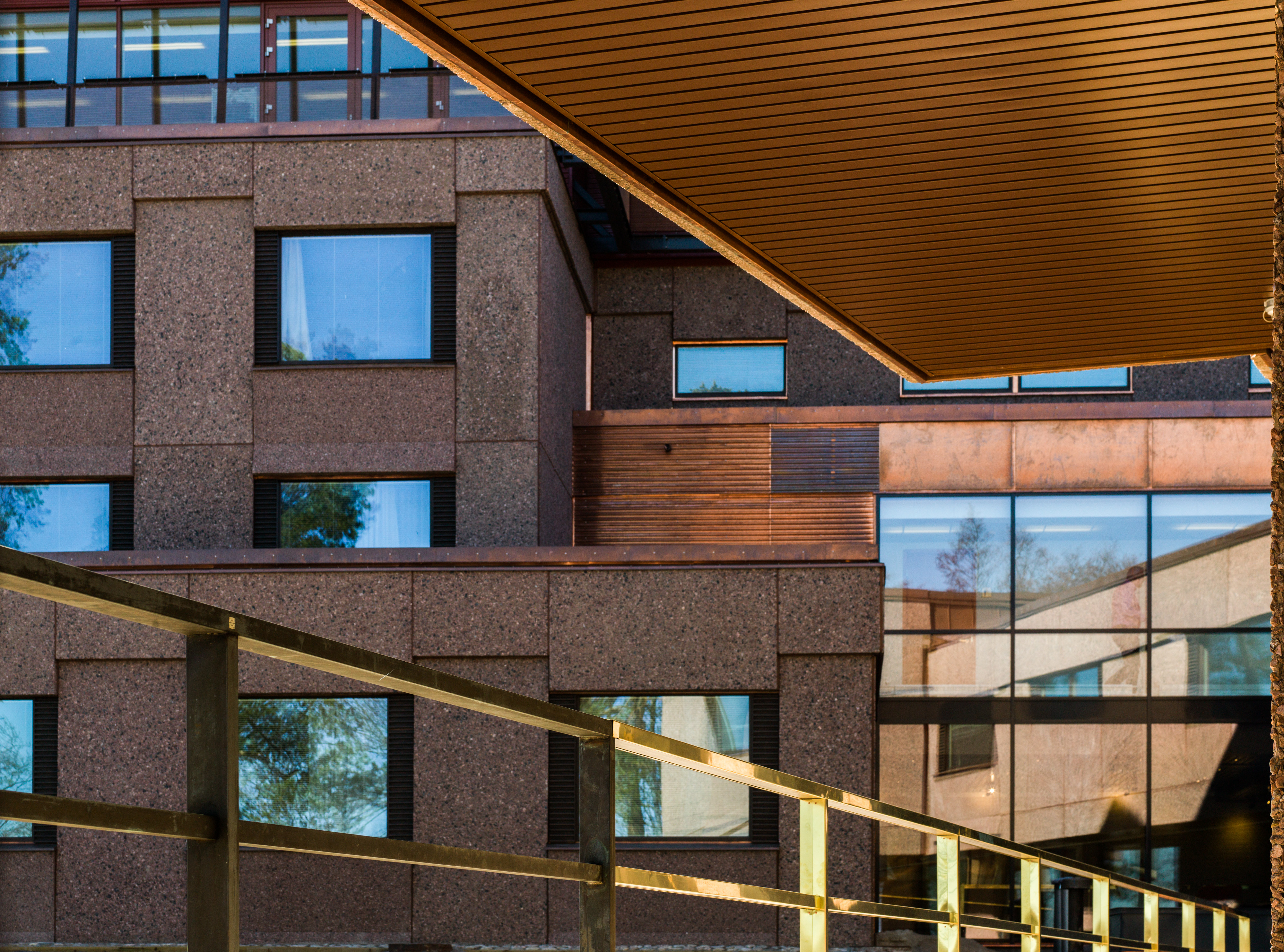 Hanasaaren kultuurikeskus - rakennus